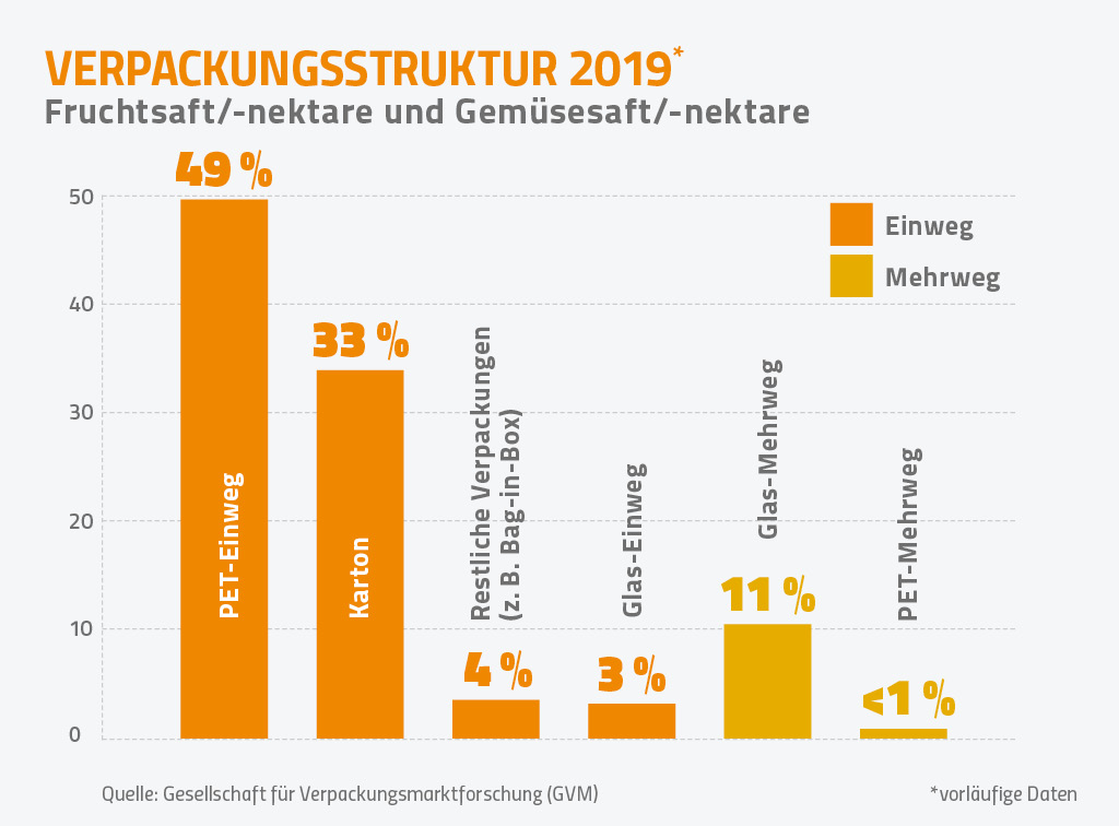 Grafik zur Verpackungsstruktur Fruchtsafte/-nektare und Gemüsesaft/-nektare